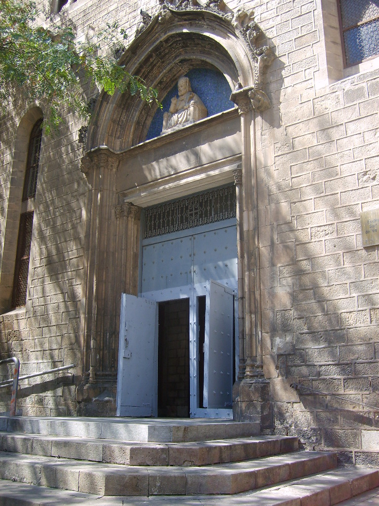 Sant Pere de les Puel·les (Barcelona)